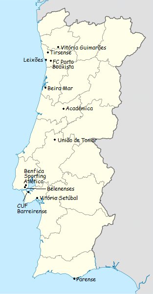 Carta dos clubes participantes do campeonato de portugal de futebol de primeira divisao 1971-1972